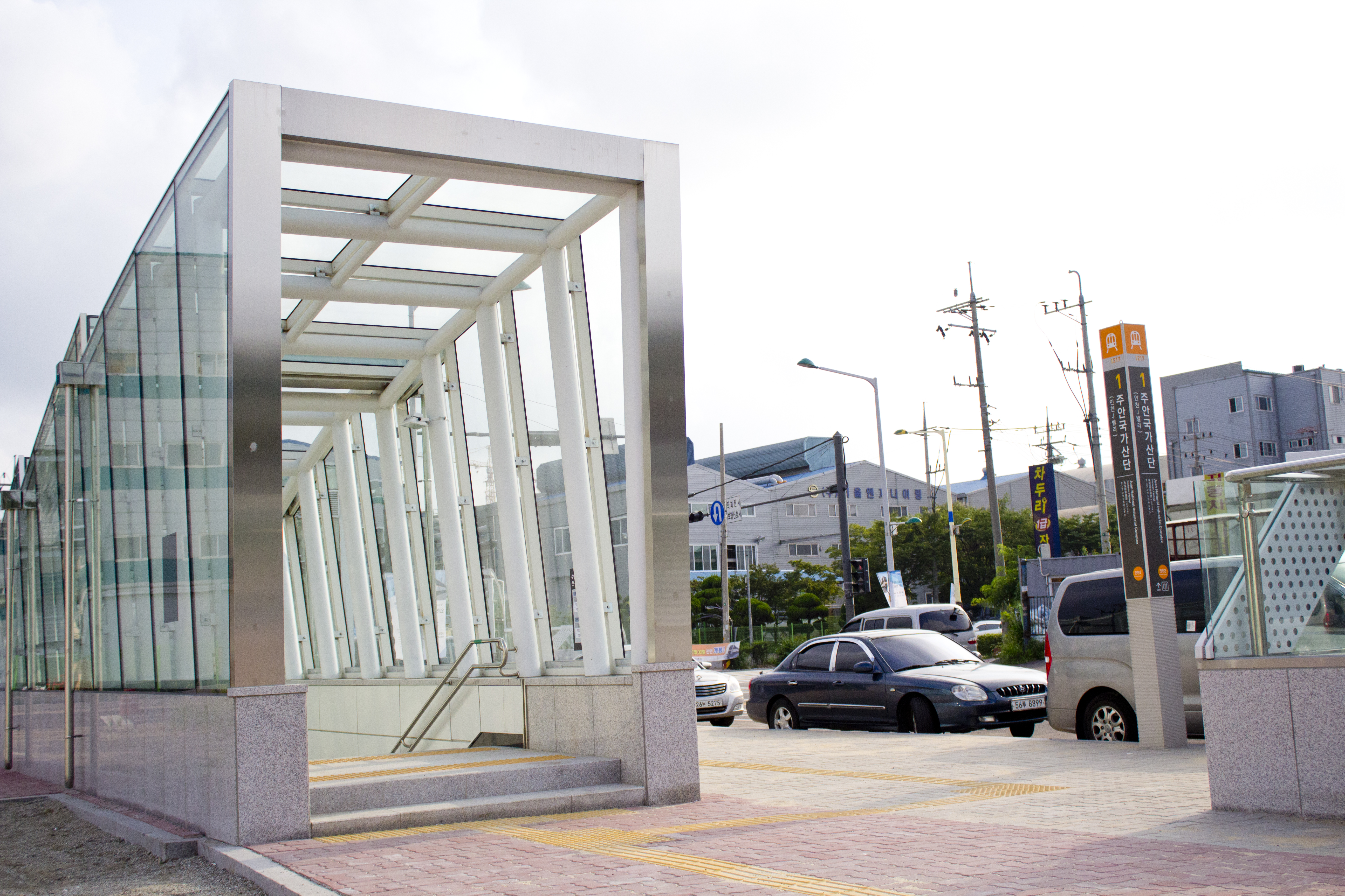 인천2호선 주안국가산단역 1번출구